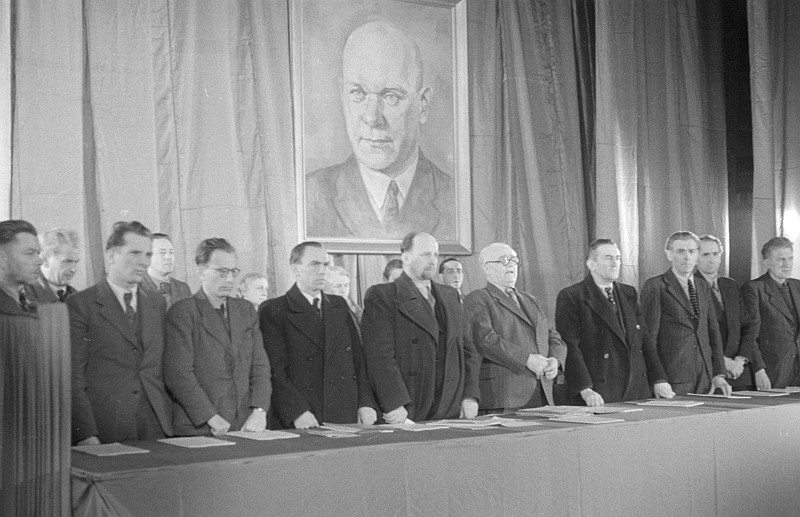 Original image description from the Deutsche FotothekPorträts: H. Köhnen Bernard Koenen, Olga Körner, Eva Höhn, Gertrud Graeser (Rast), Walter Fisch, Maria Rentmeister